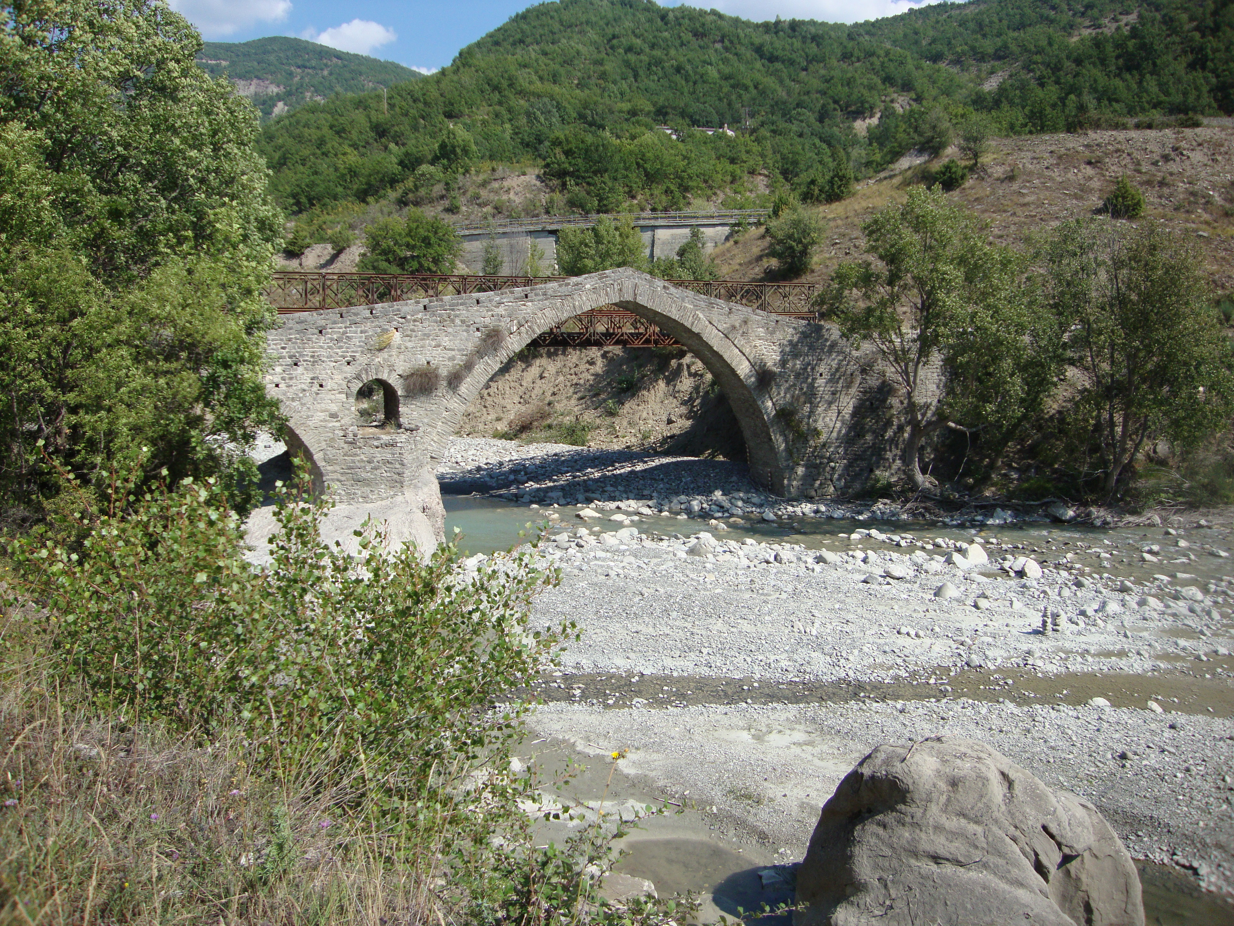 Το γεφύρι της Δροσοπηγής στον Σαραντάπορο